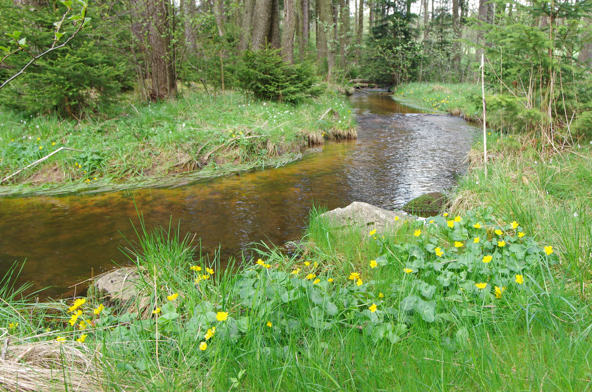 Tatrovický potok v místě nad vodní nádrží Tatrovice, okres Sokolov